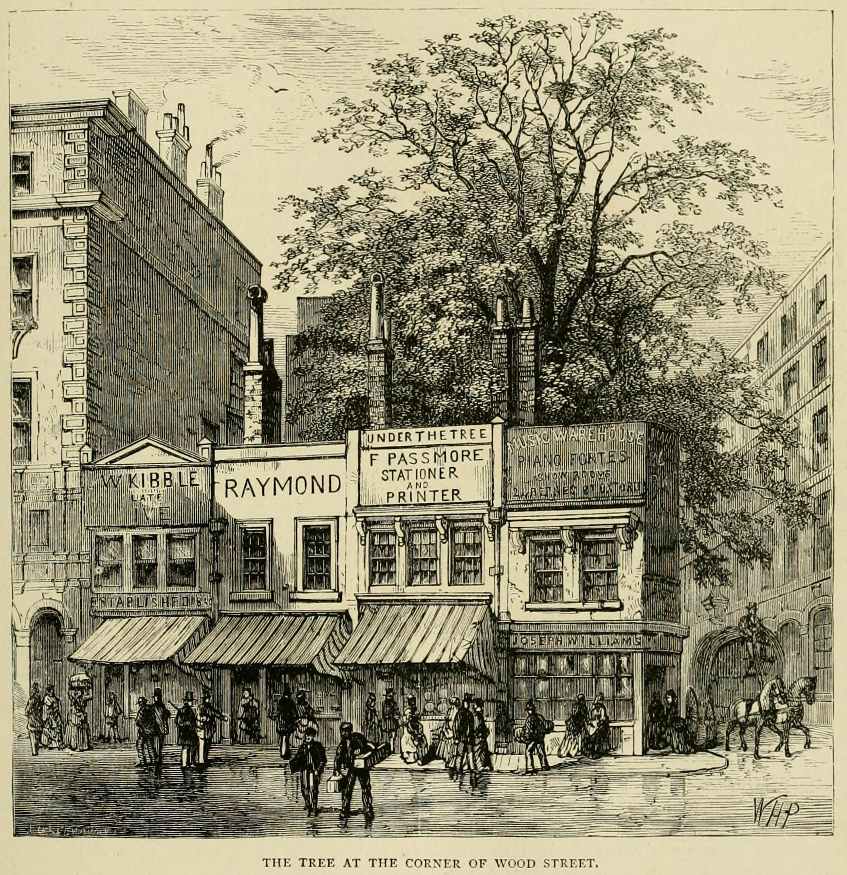 Arbor antiqua (Platanus hispanica) apud Wood Street (Londinensis) locata, circa anno MDCCCL delineata